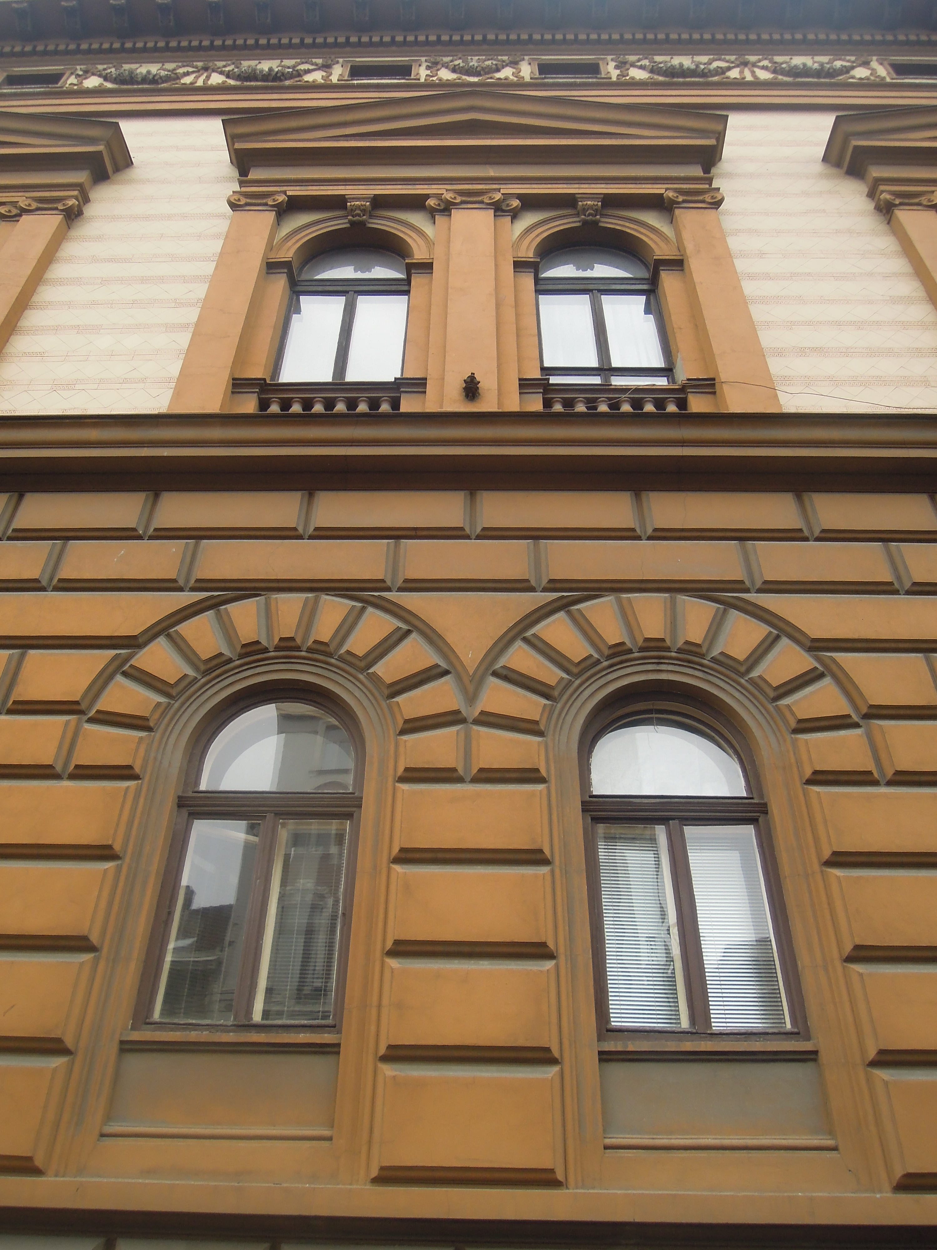 Zgrada Ministarstva pravde u Beogradu.